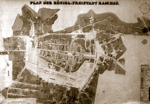 Ottov plán